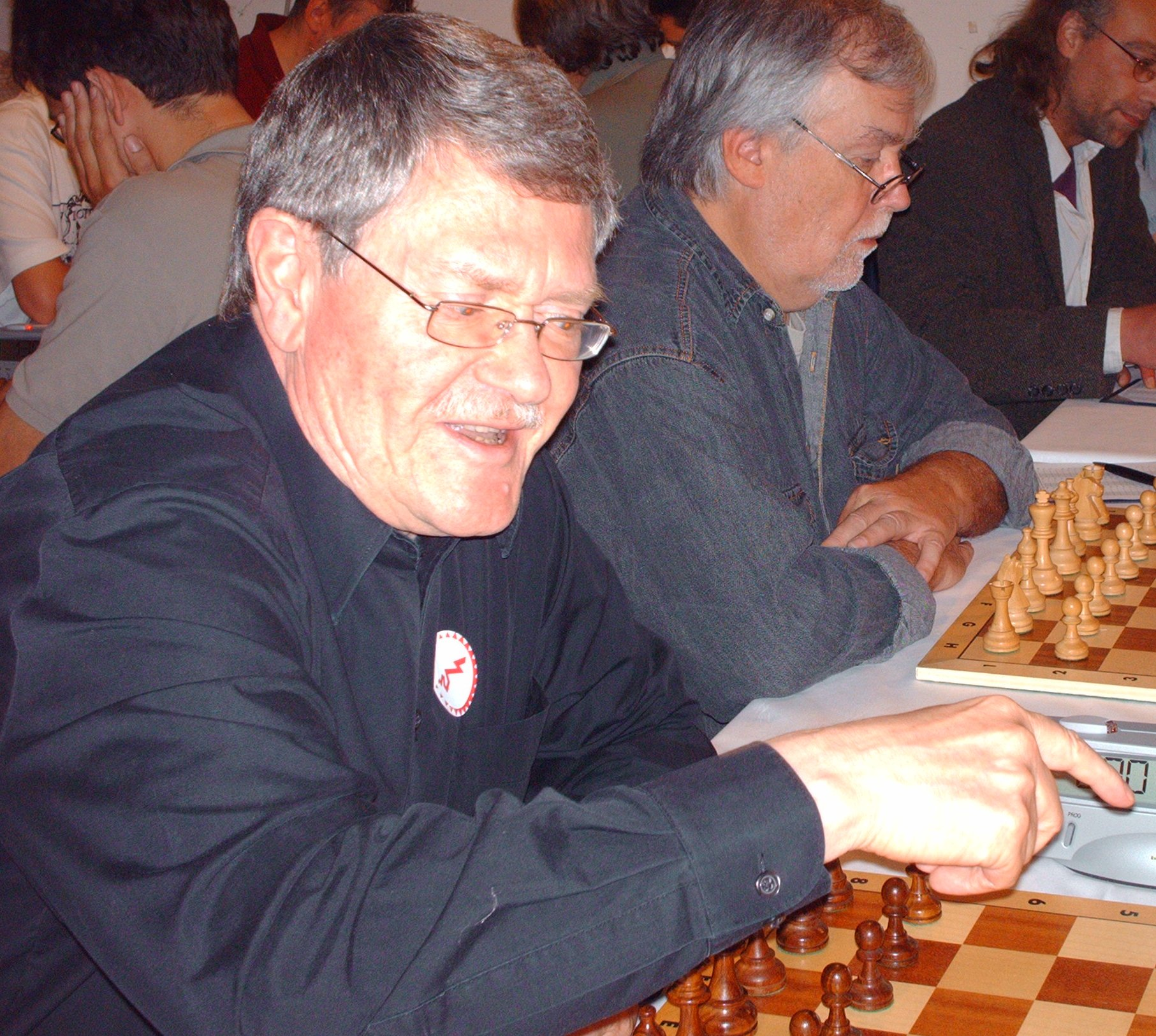 Heinrich Burger am 16. Juni 2007 beim Schachfestival im Jüdischen Museum Berlin